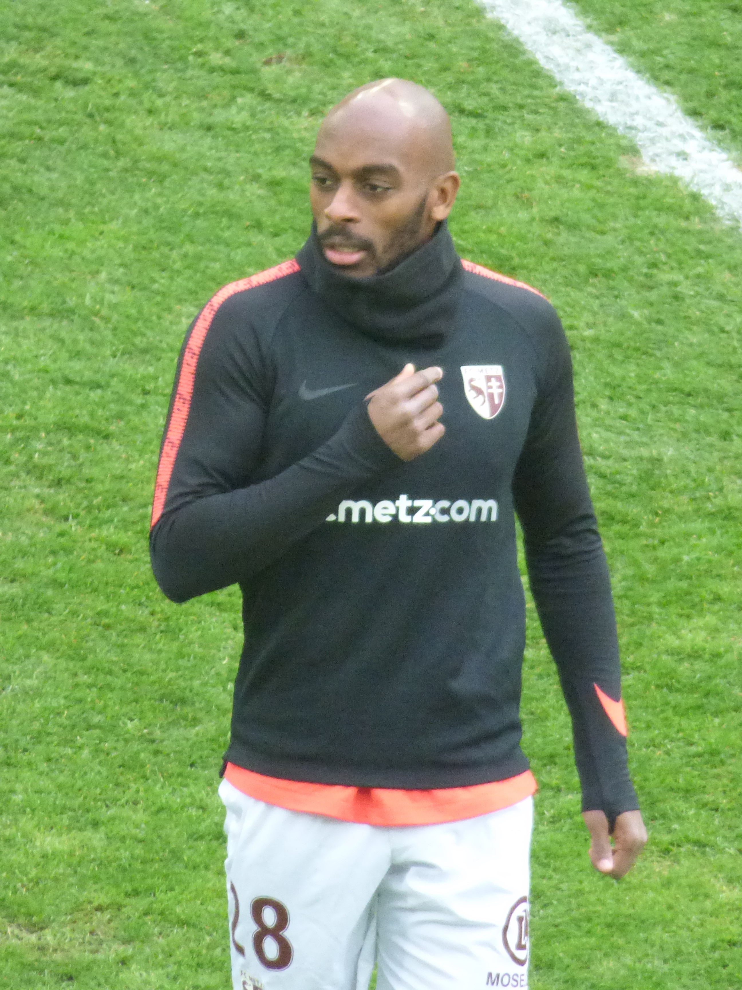 Jonathan Rivierez avant le match RC Lens / FC Metz, comptant pour la vingt-quatrième journée du championnat de France de Ligue 2 2018-2019, le 9 février 2019, au Stade Bollaert-Delelis.